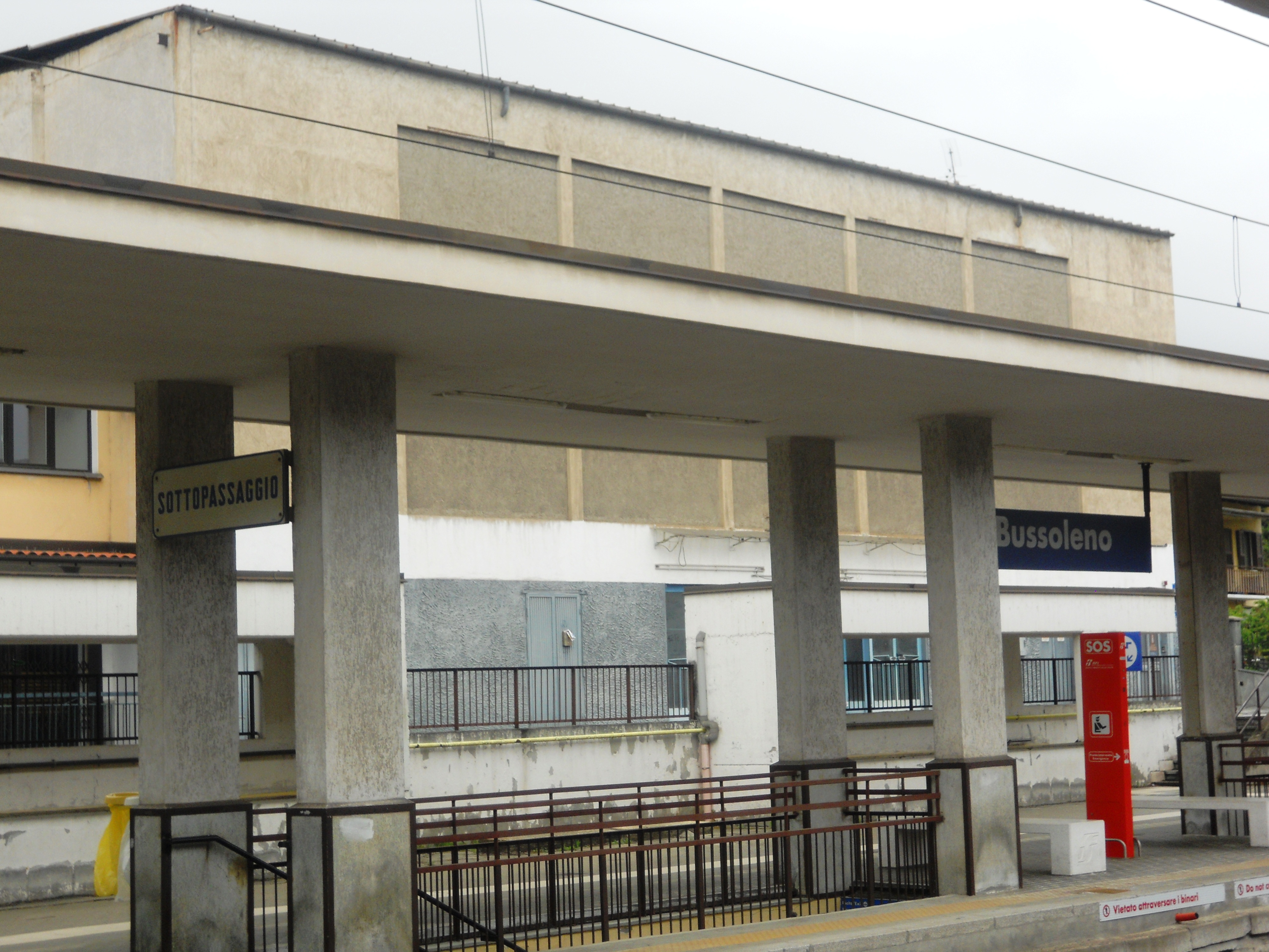 Veduta Stazione di Bussoleno